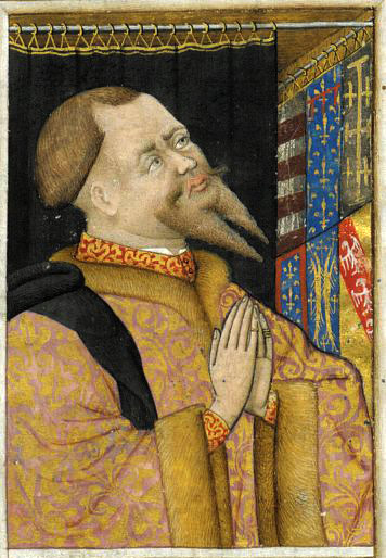 Portrait du roi René en prière